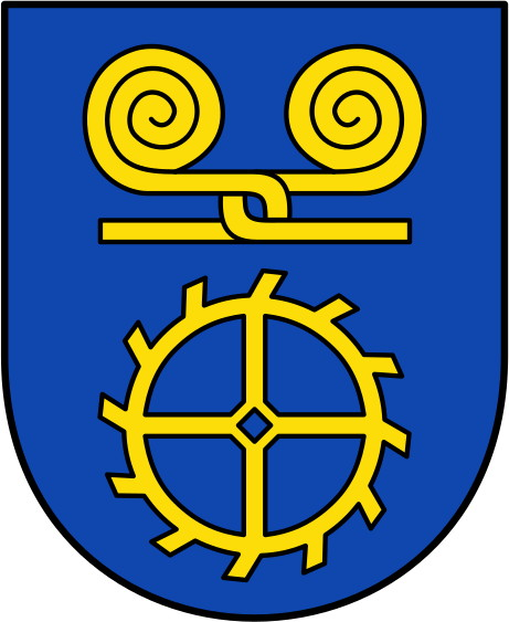 Coat of arms Deinstedt, Wappen der Gemeinde Deinstedt